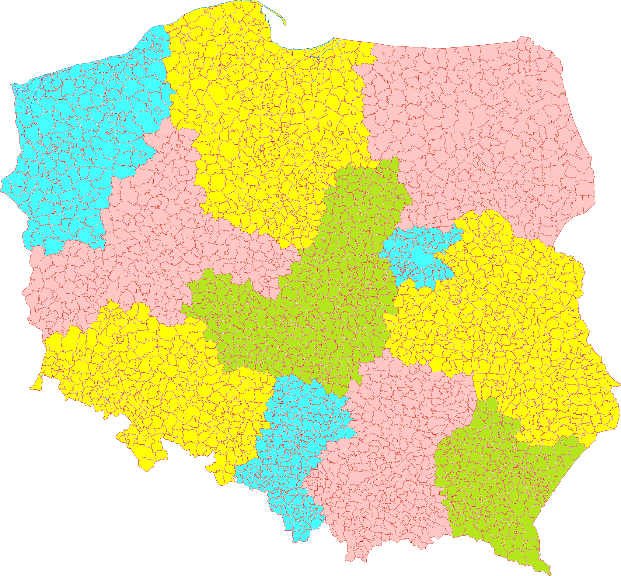 Mapa właściwości miejscowej sądów apelacyjnych w Polsce (stan na 16 XII 2017 r.). PS: autorem grafiki z podziałem Polski na gminy jest użytkownik Aotearoa.